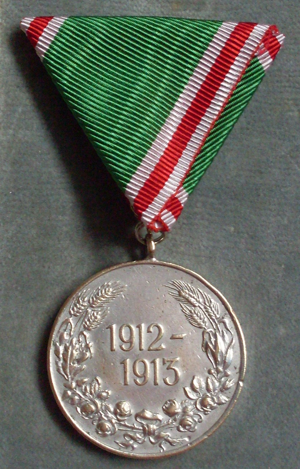 Bulgarische Kriegserinnerungsmedaile 1912/1913 Revers